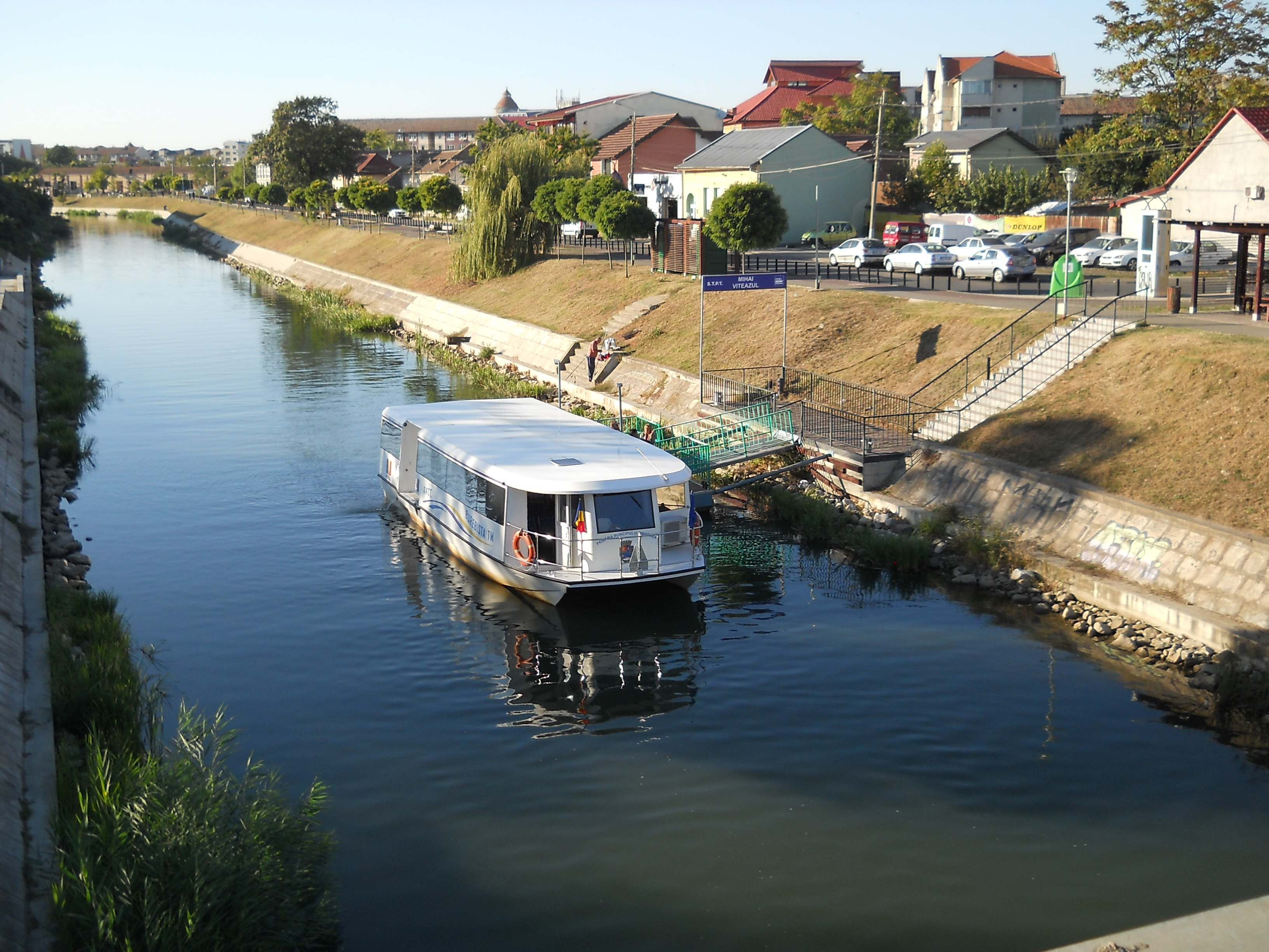 Stația de vaporetto Mihai Viteazu, cu un hidrobuz ce a sosit în stația finală. După ce urma să facă bucla de întoarcere la Uzina Electrică, același hidrobuz urma să preia primii pasageri pe direcția aval. Fotografia a fost preluată a doua zi după debutul transportului public în comun pe apă.